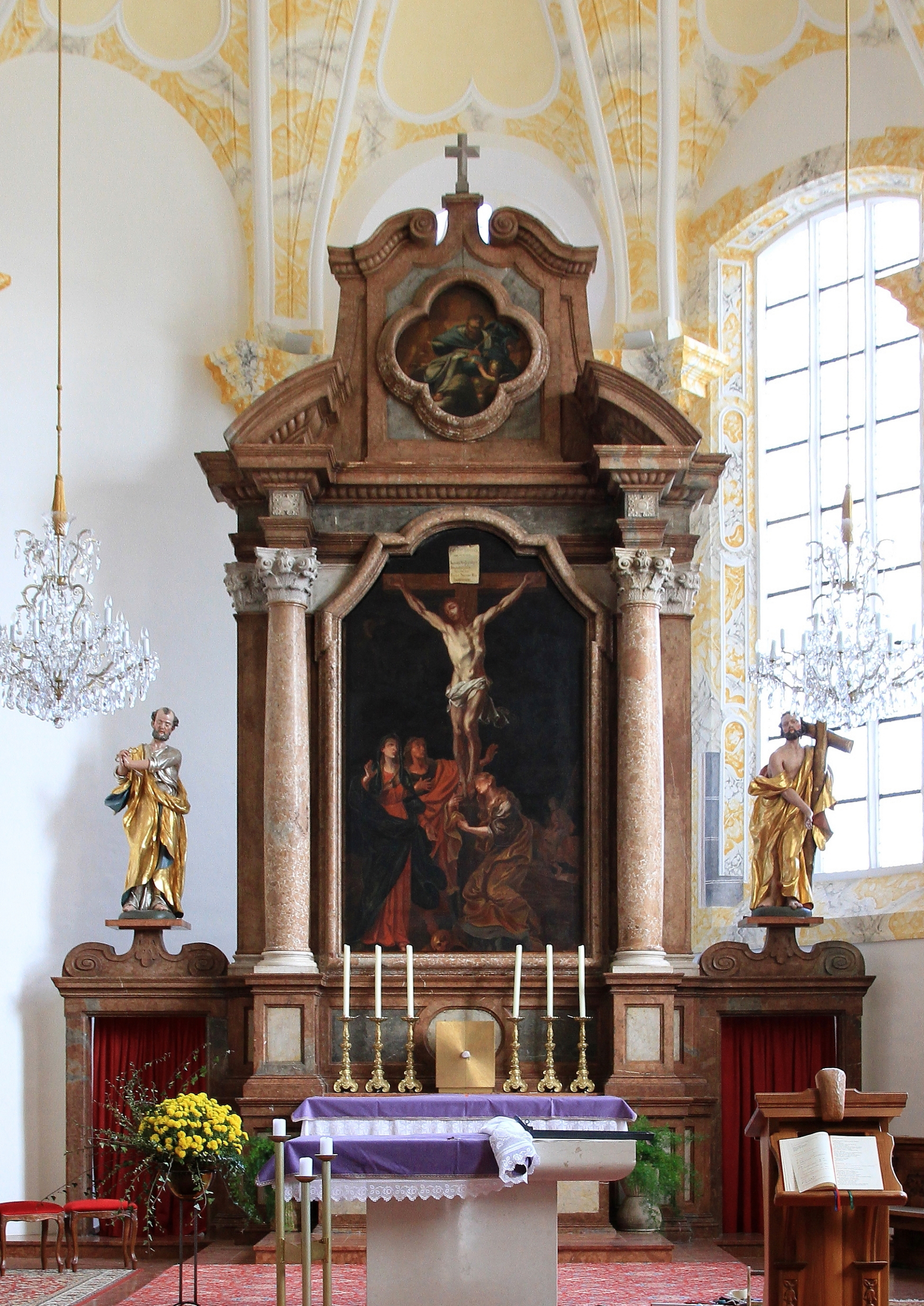 Hochaltar der Filialkirche St. Anna in Oberthalheim. Er wurde um 1700 gefertigt und 1969 von der ehemaligen Schlosskapelle Auhof bei Linz hierher übertragen. Das Altarbild stammt aus dem Ende des 17. Jahrhunderts von Johann Karl von Reslfeld und stellt die Kreuzigung Christi dar.